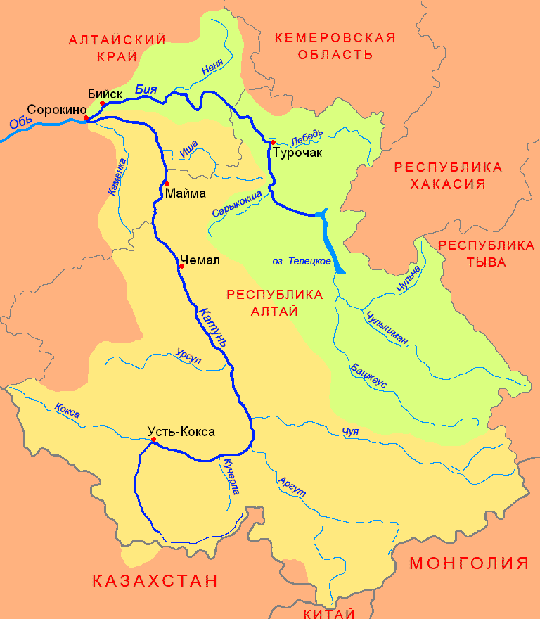 Схема бассейнов Катуни и Бии